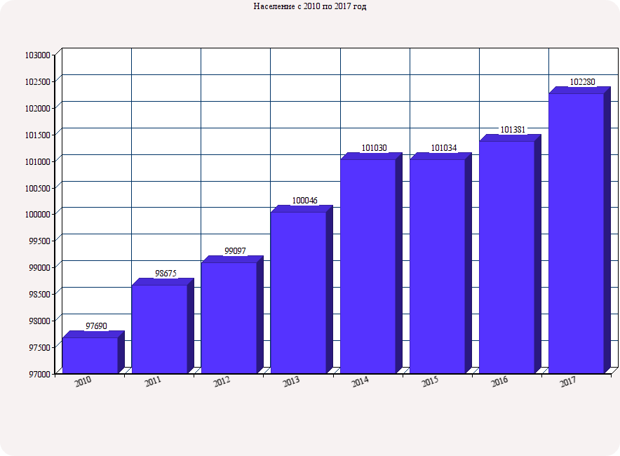 График изменения популяции в Делфте